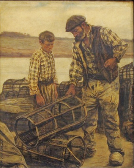 Achille Granchi-Taylor : La préparation des casiers (huile sur toile, 63,5 x 48 cm)